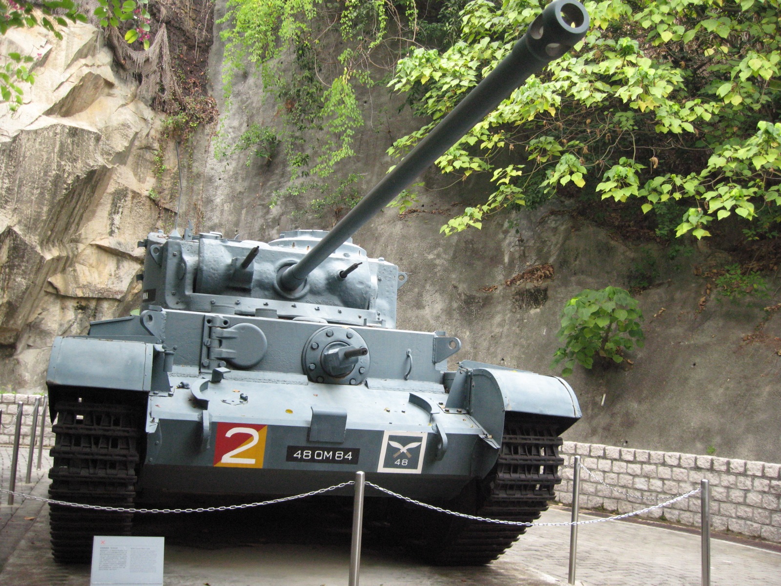 在香港海防博物館中展示的英國製彗星一型坦克